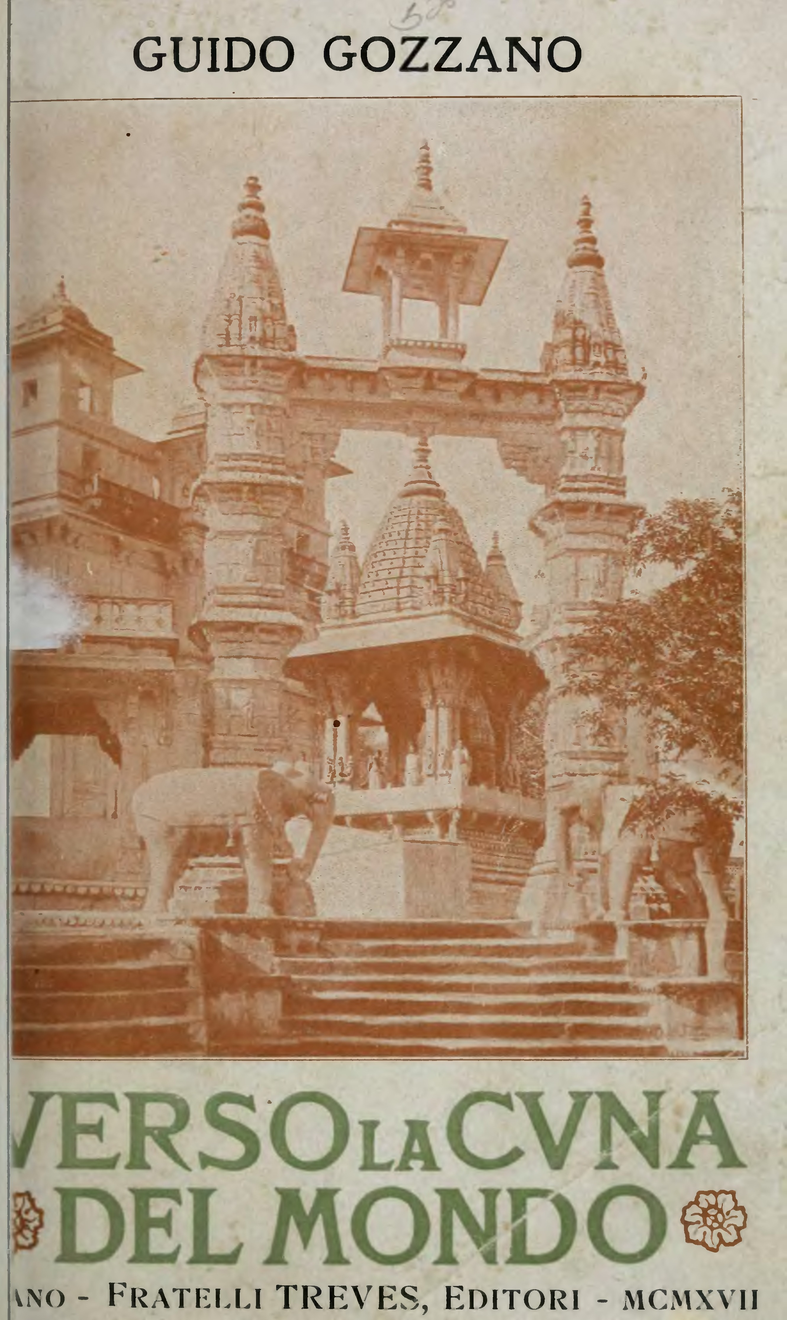 Verso la cuna del mondo, racconti di un viaggio in India di Guido Gozzano, Treves, Milano 1917